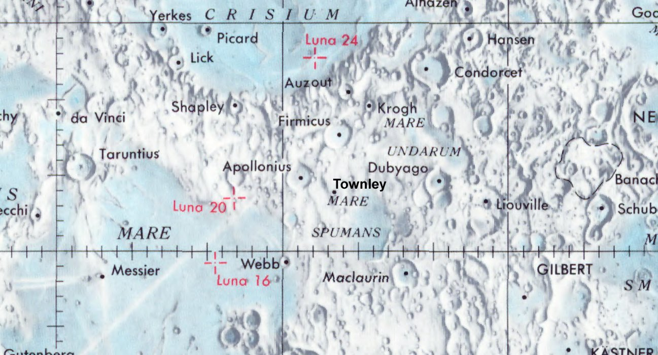 Cráter lunar Townley. Localización. (Lunar Chart LPC1. Second Edition)